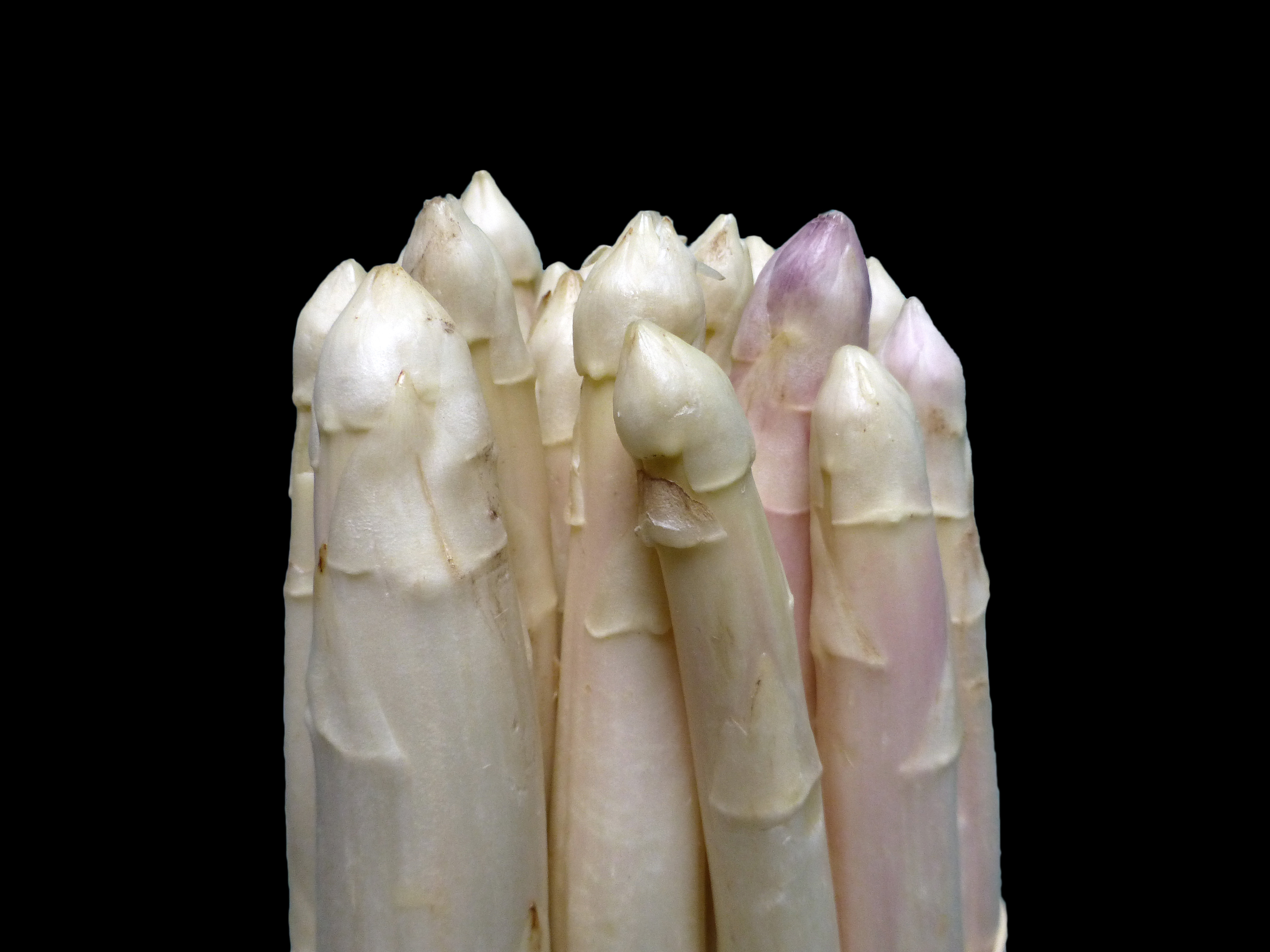 Pointes d'asperges blanches d'Alsace (Hoerdt)